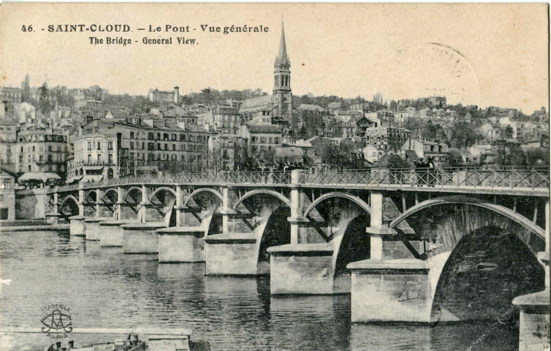 Carte postale ancienne éditée par Abeille à Paris, n°46 : SAINT-CLOUD - Le Pont